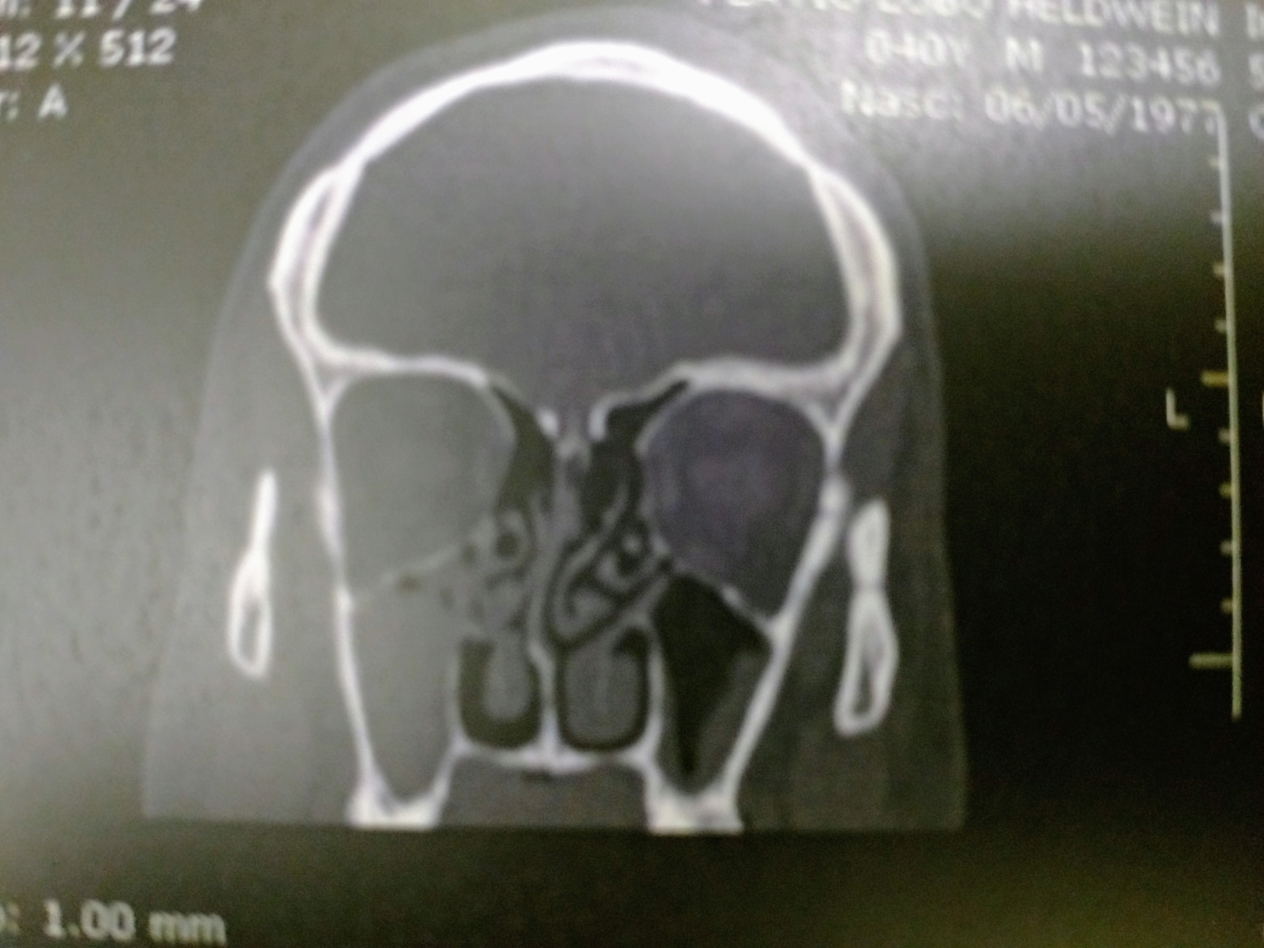 Tomografia demonstrando seio maxilar direito velado com sinusite